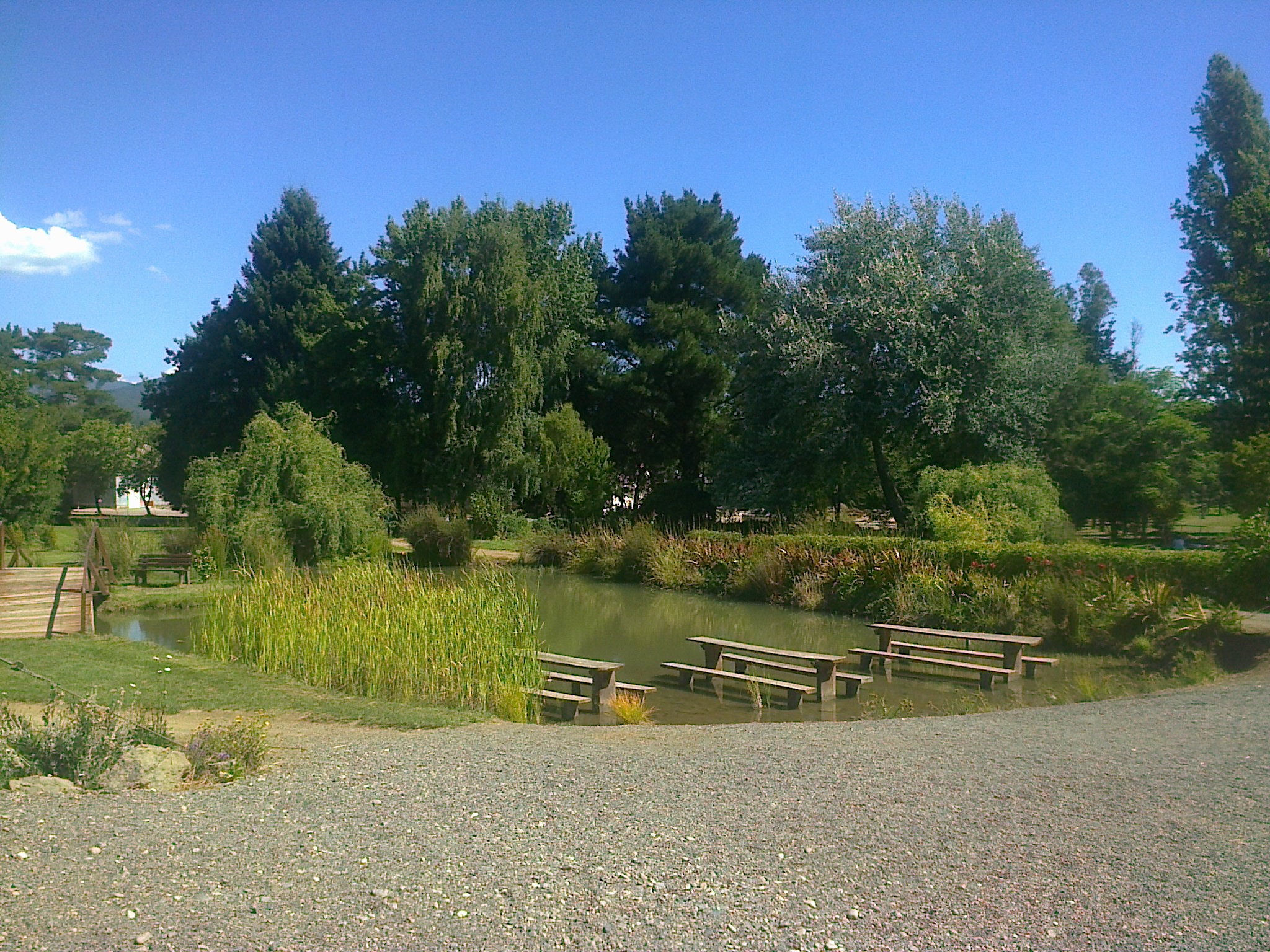 Laguna artificial en Villa Baviera